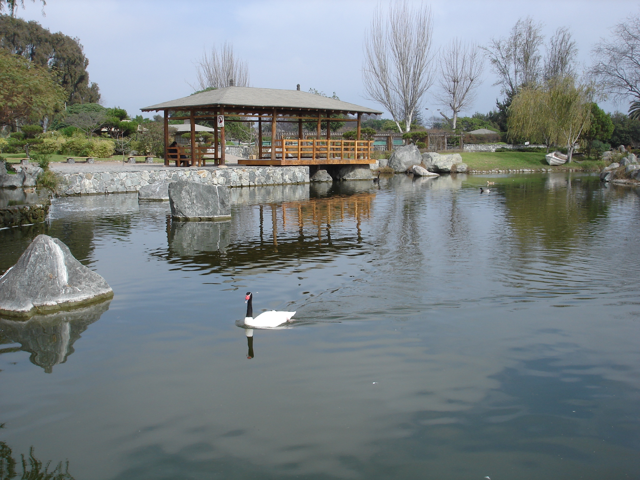 DSC01194 - La Serena - Jardín japonés